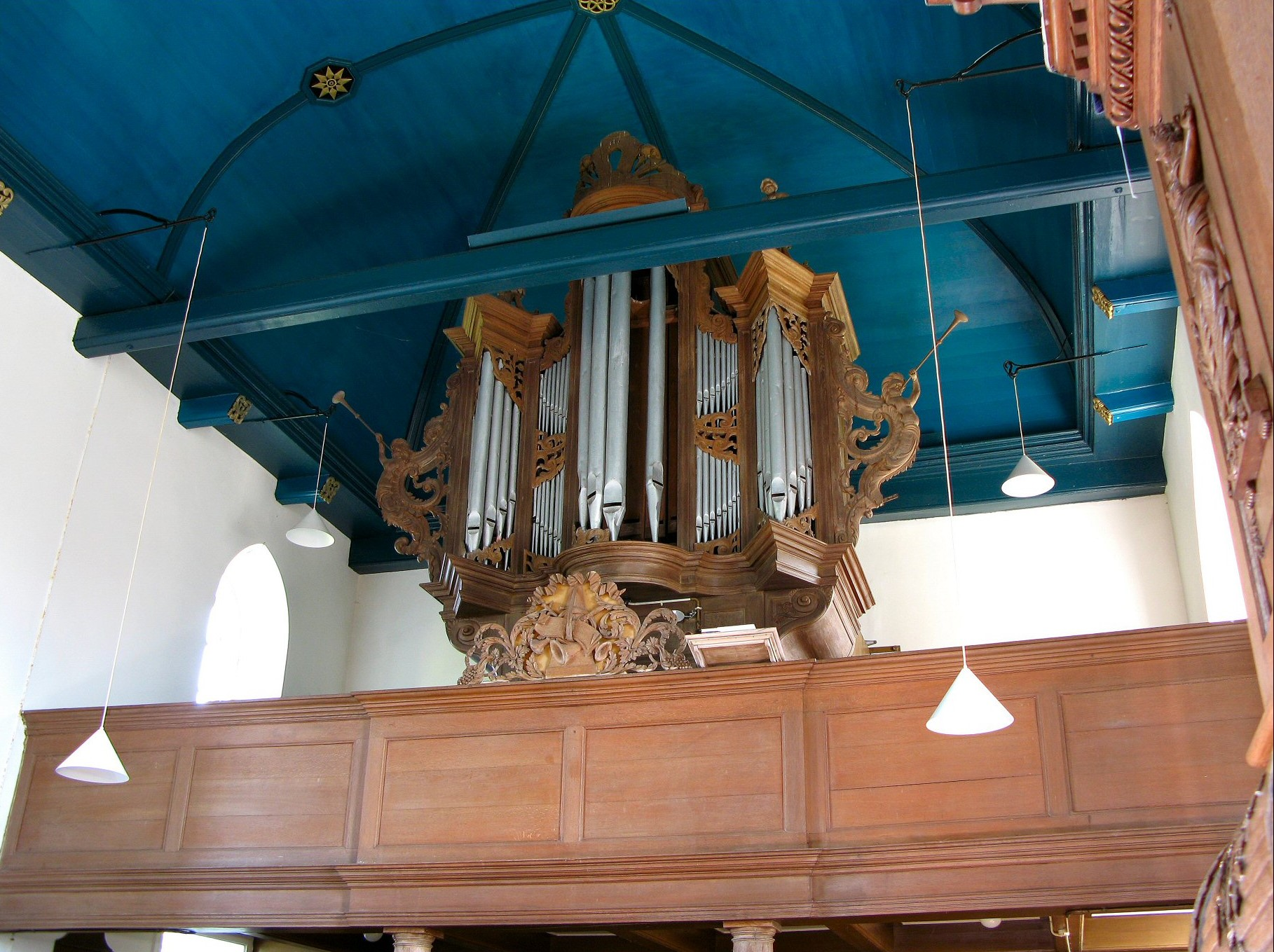 Orgel in Meeden, Niederlande